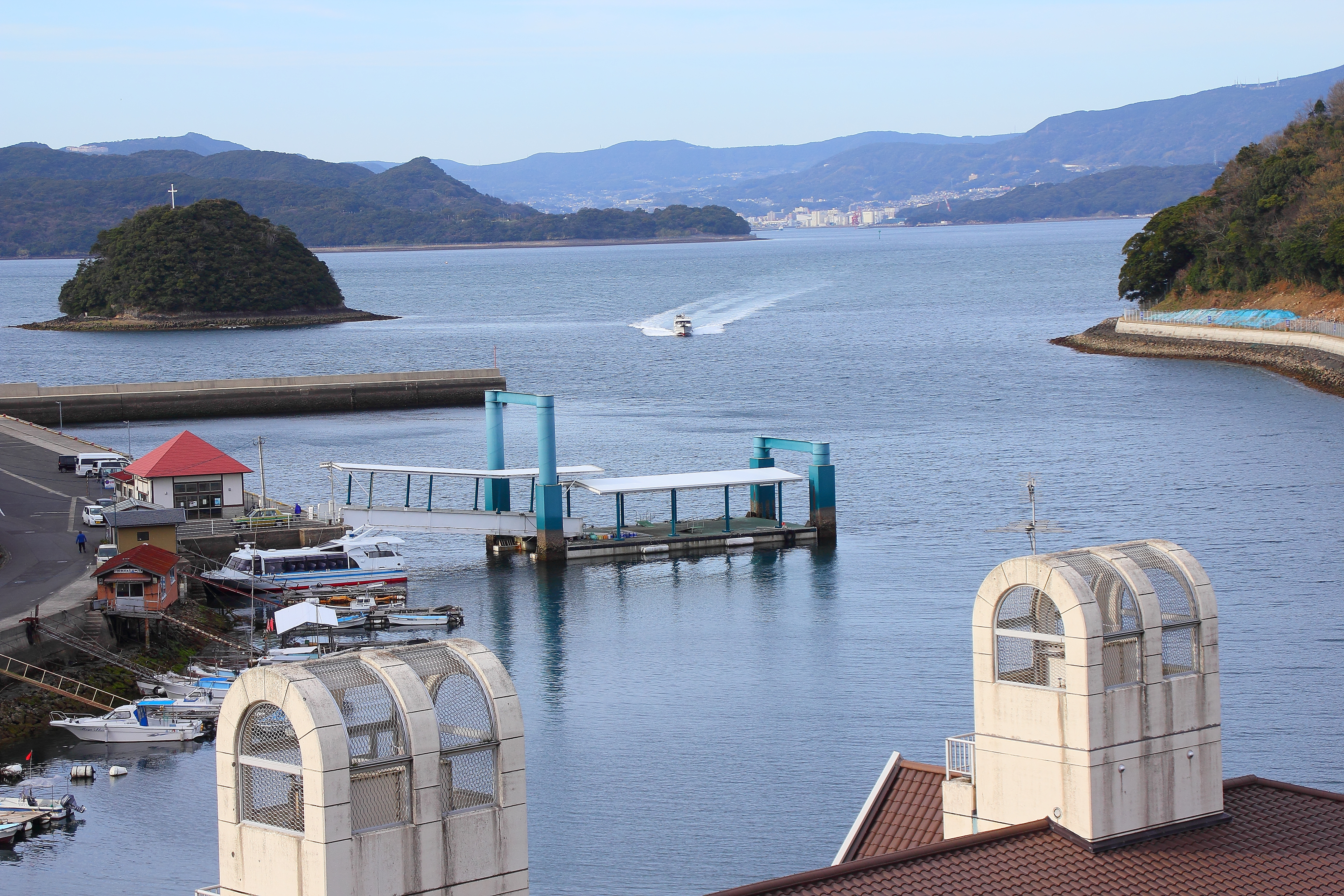 西海市西海町横瀬浦 Canon EOS 60D